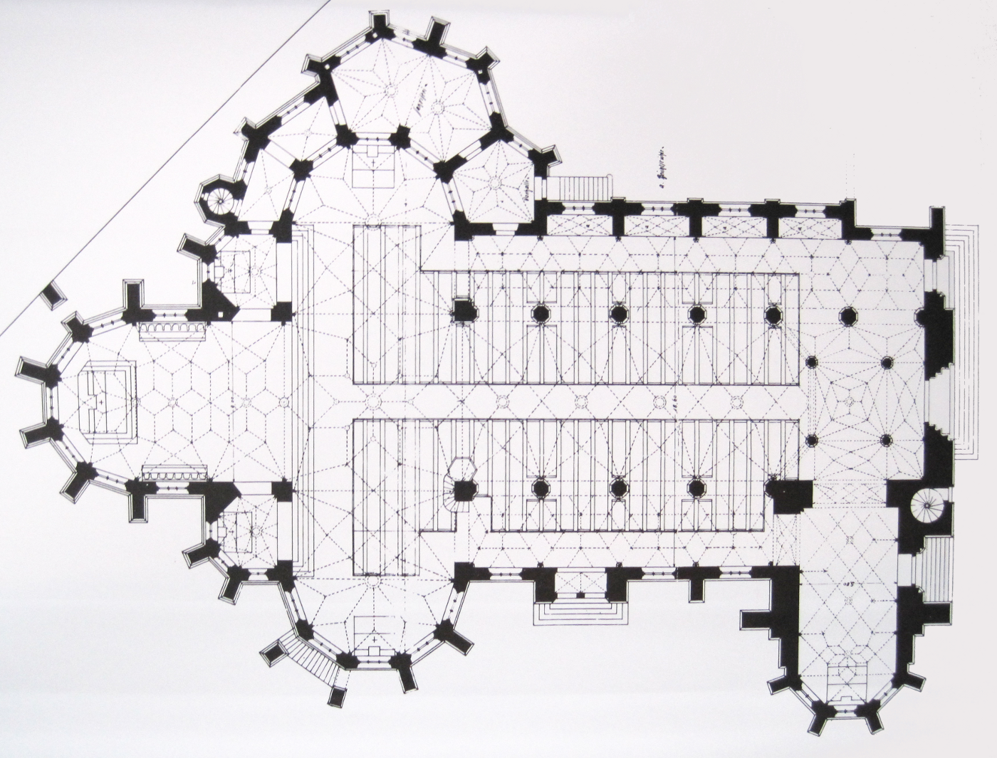 Liebfrauenkirche in Mannheim-Jungbusch